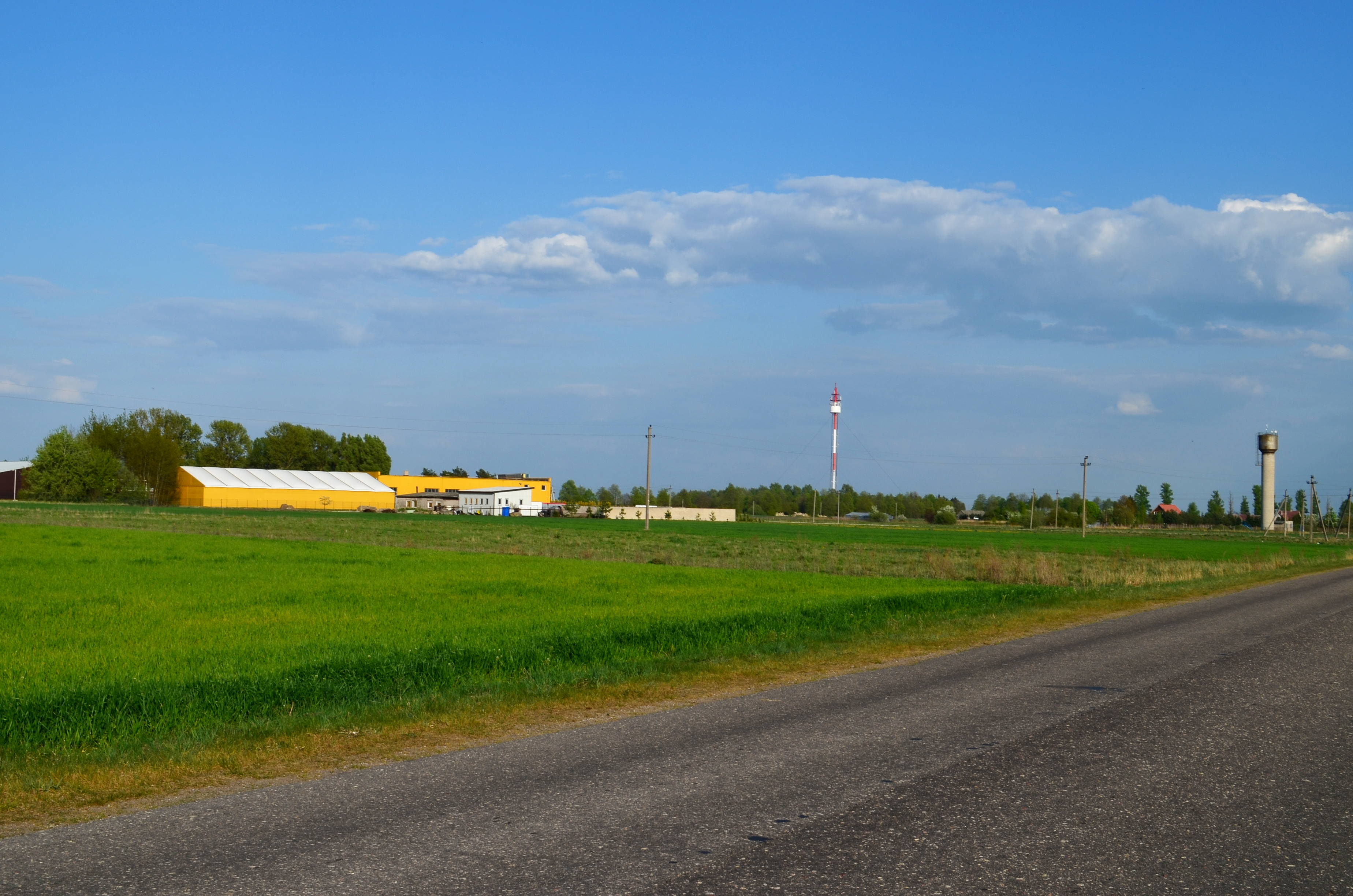 Josvainių kaimas, Kėdainių raj.